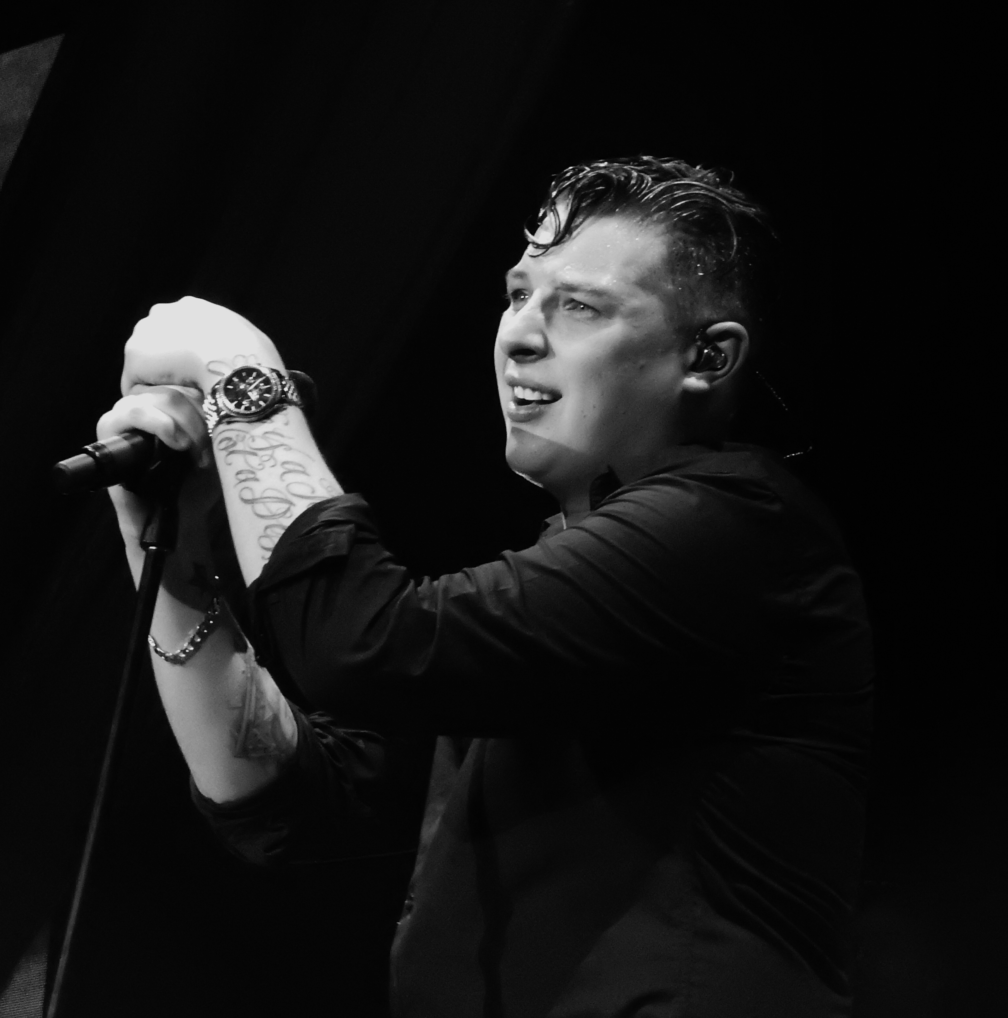 John Newman en el O2 Arena de London, Reino Unido, actuando como telonero de Ellie Goulding en marzo de 2016.